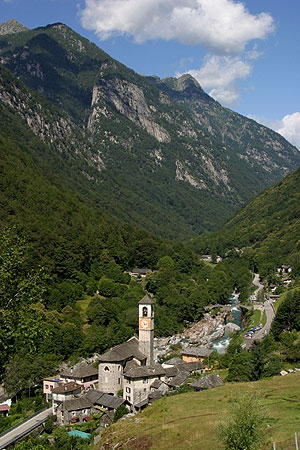 Lavertezzo